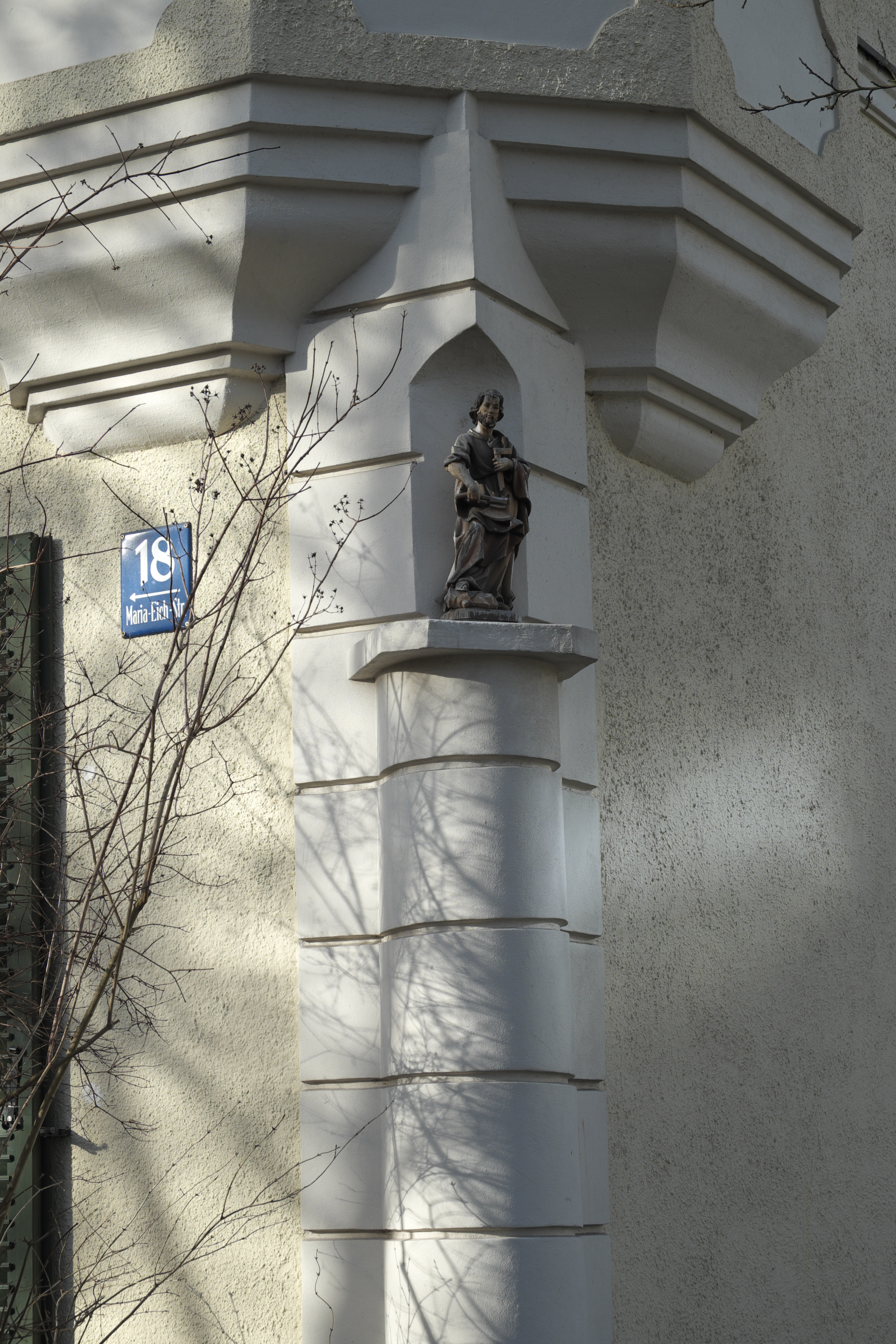 Villa in der Maria-Eich-Straße 18 in Pasing im Stadtbezirk Pasing-Obermenzing in München (Bayern/Deutschland), Heiligenfigur